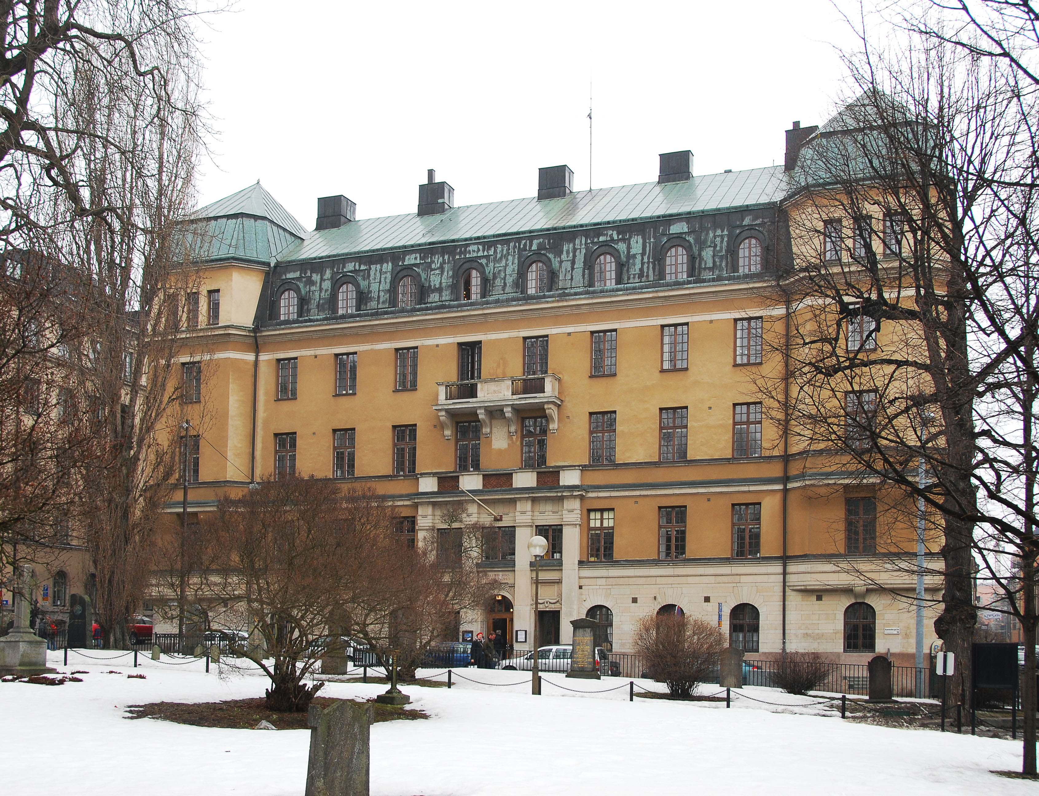 Adolf Fredriks Församlingshus, Kammakargatan 30 Stockholm. Byggt 1908-1910.